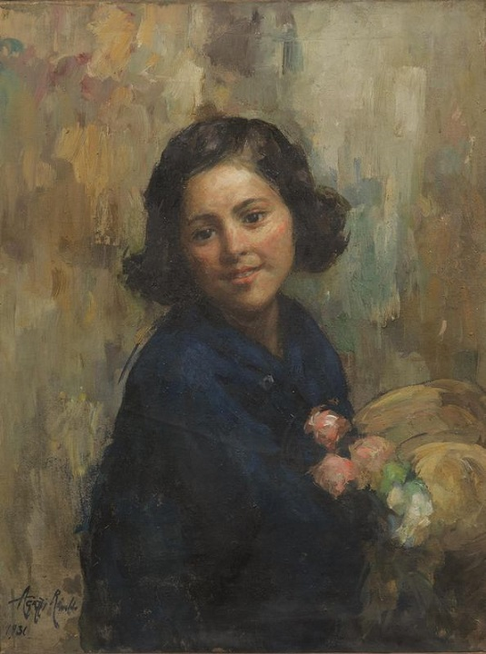 "Ritratto di fanciulla", olio su tela, 75 x 58 cm., firmato